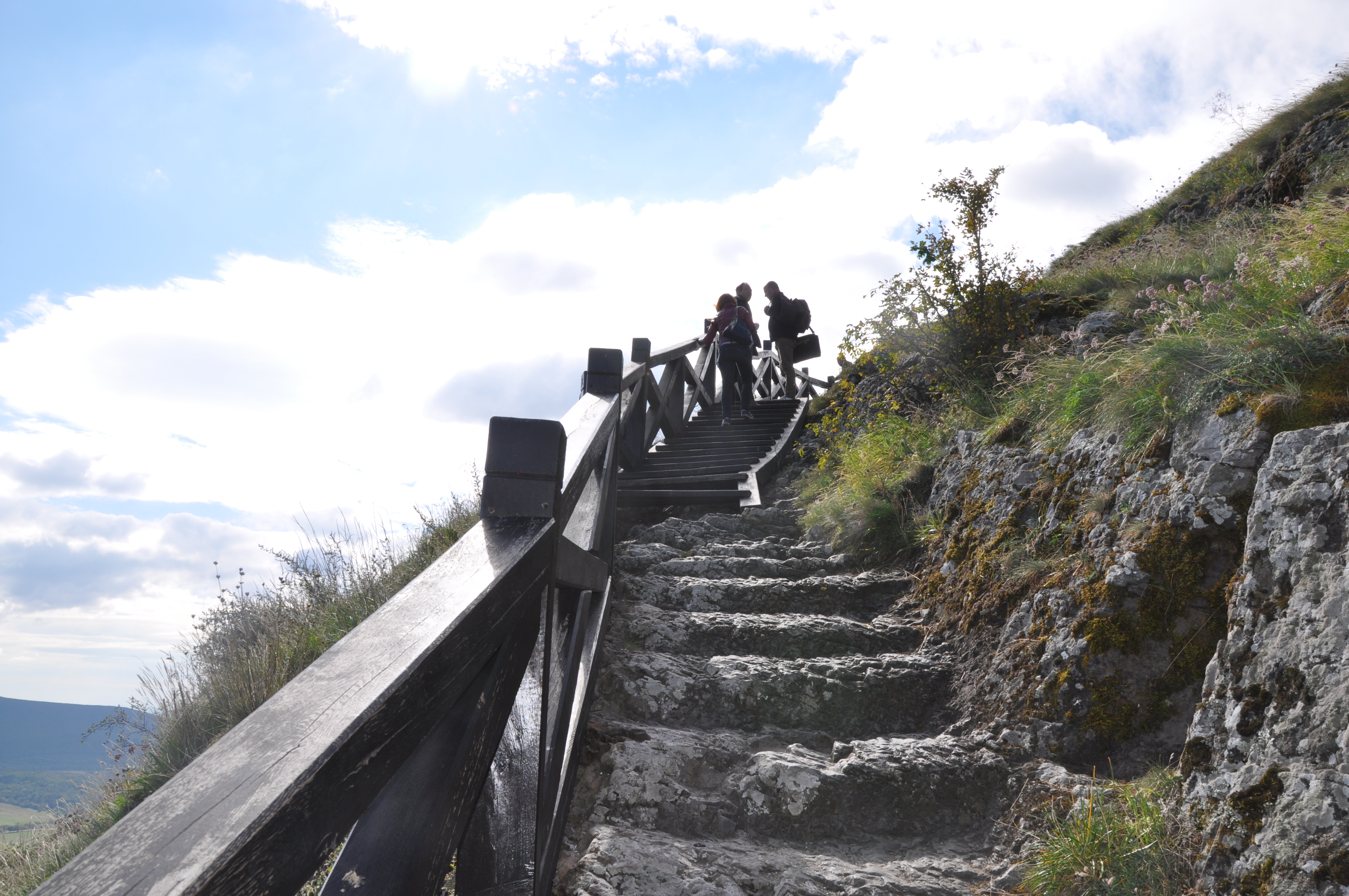 Az újjáépült Füzér vára, sziklalépcső